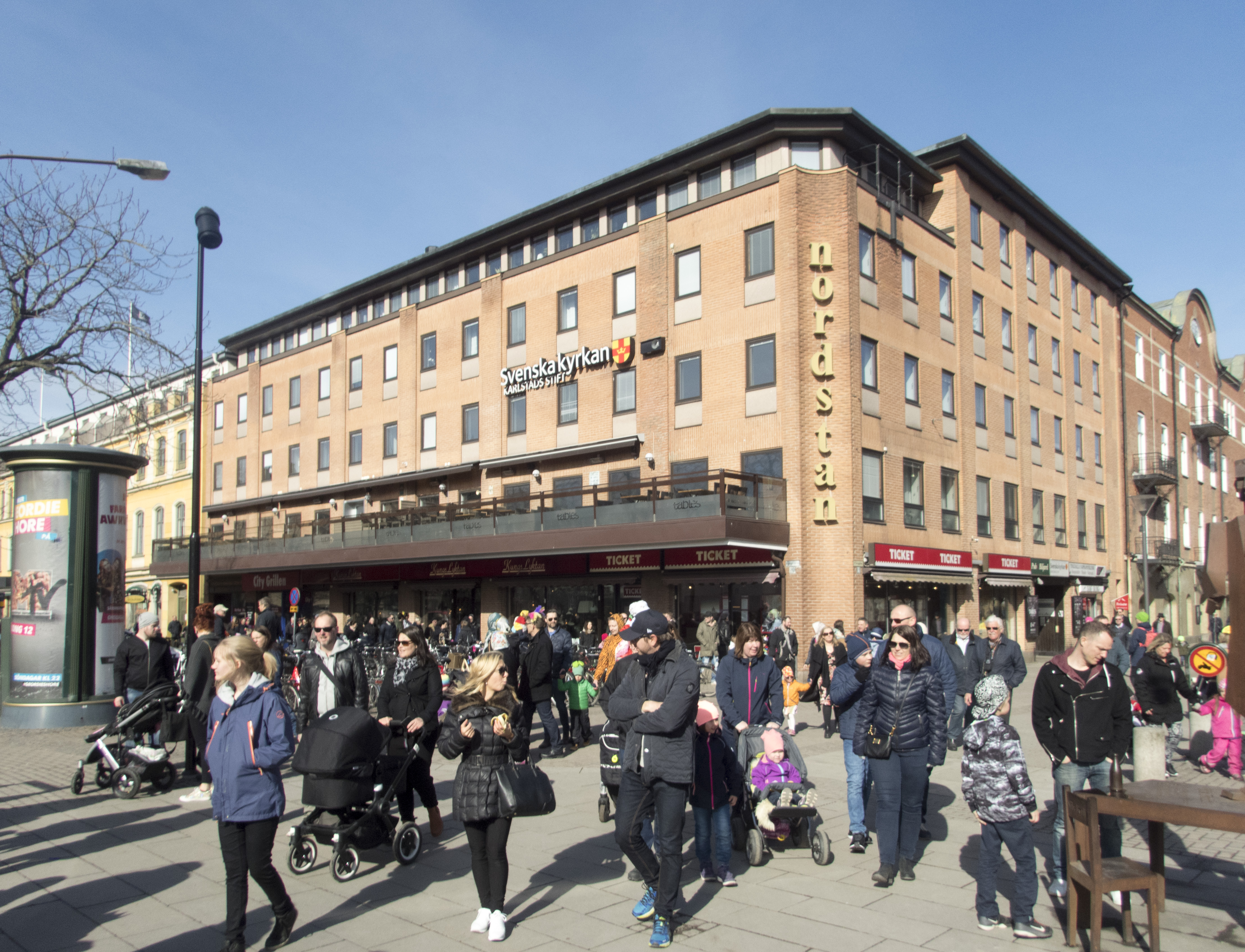 Stiftshuset, Kungsgatan/Västra torggatan Karlstad